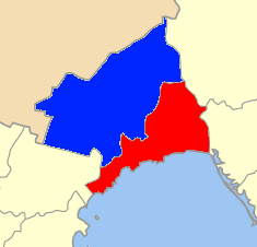 Χάρτης με τις ενότητες που αποτελούν τον Δήμο Καβάλας